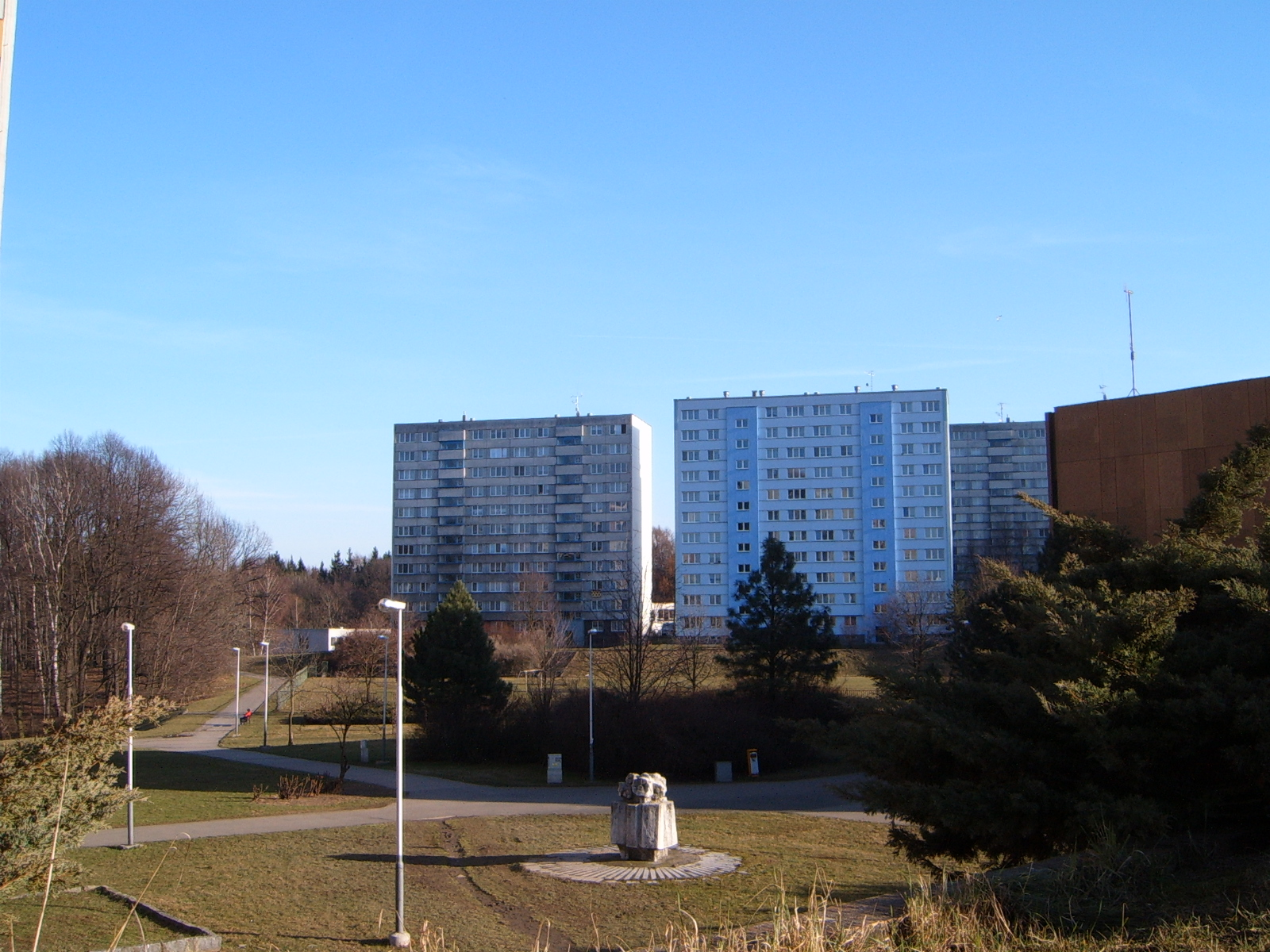 Výškovice, Srbská